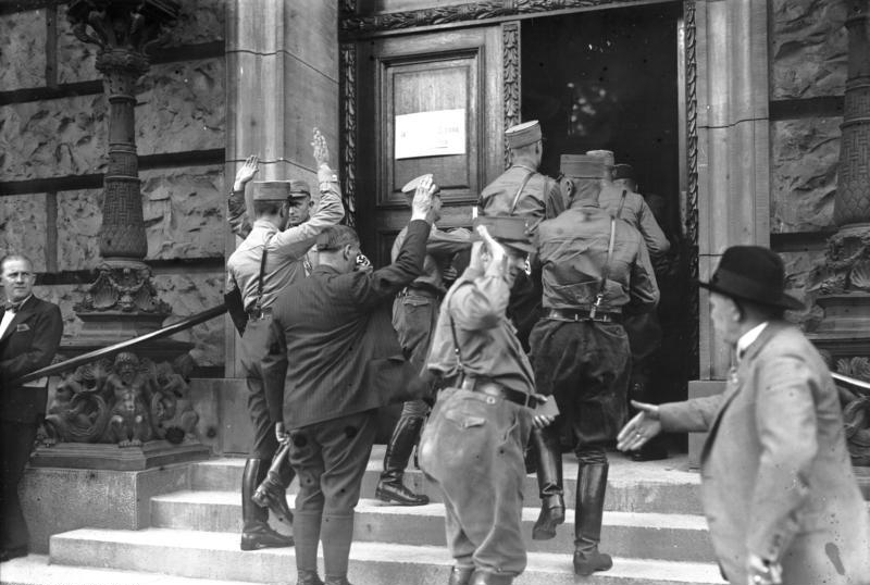 Die Eröffnung des neuen deutschen Reichstages am 30. August 1932 unter grossen polizeilichen Absperrungsmassnahmen ! Neugewählte nationalsozialistische Abgeordnete begeben sich in den Reichstag.